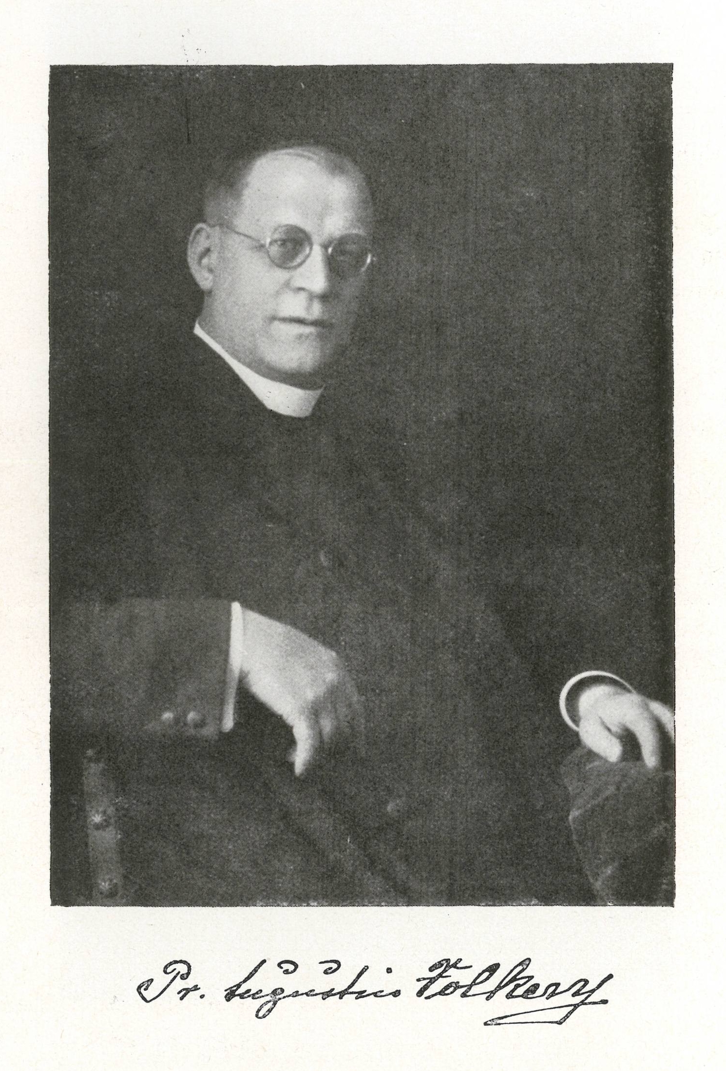 Římskokatolický kněz působící v Předlicích R.D. Augustin Volkery